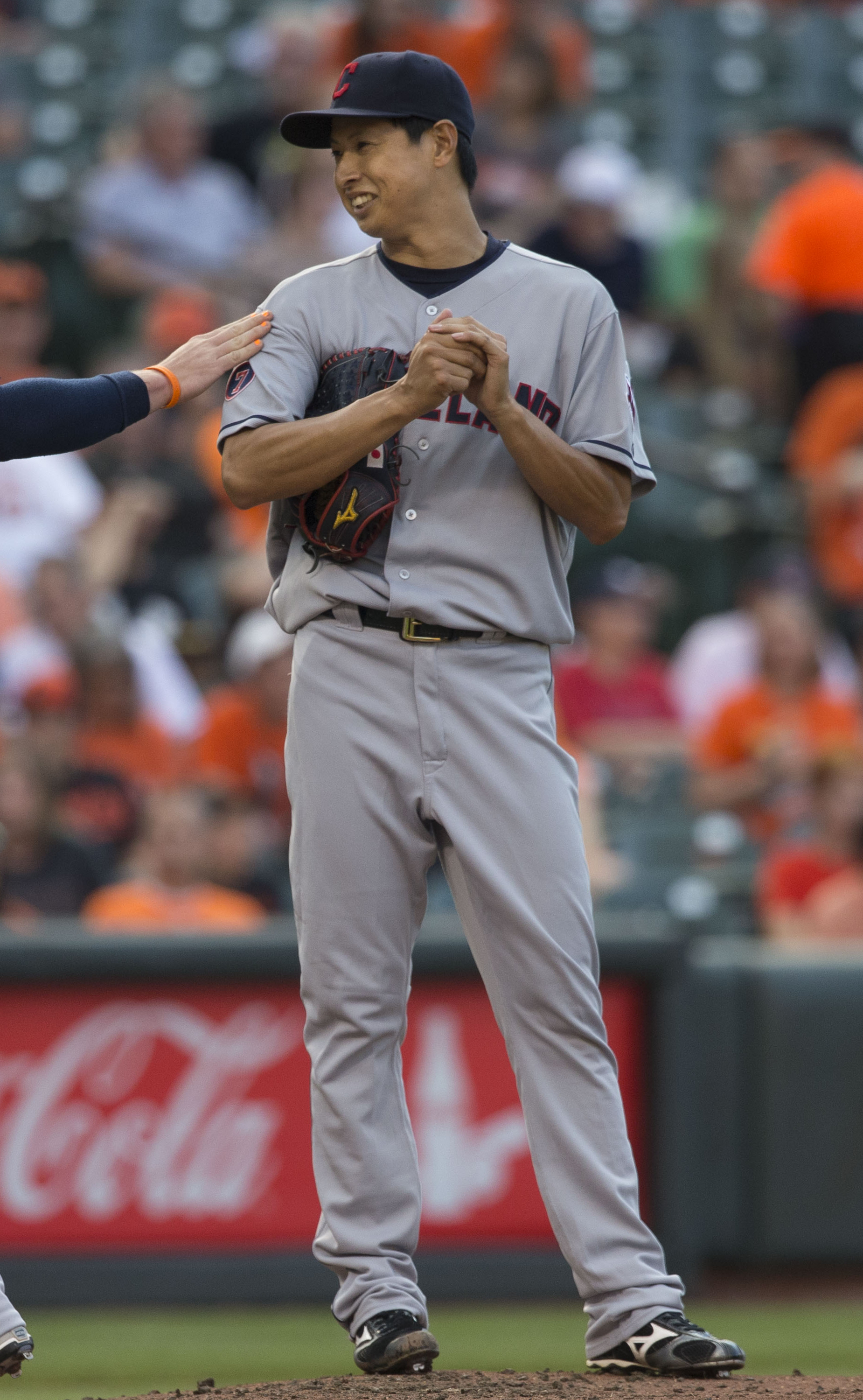 Toru Murata